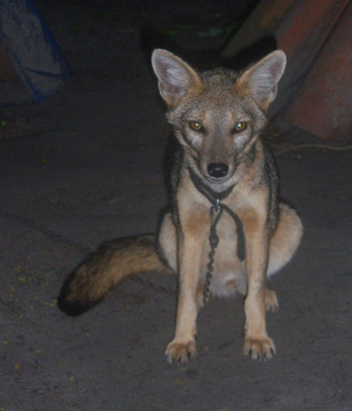 Uma raposa domesticada no interior do Ceará